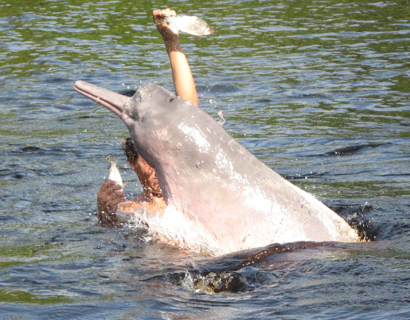 Boto Cor de Rosa im Ariau Fluss